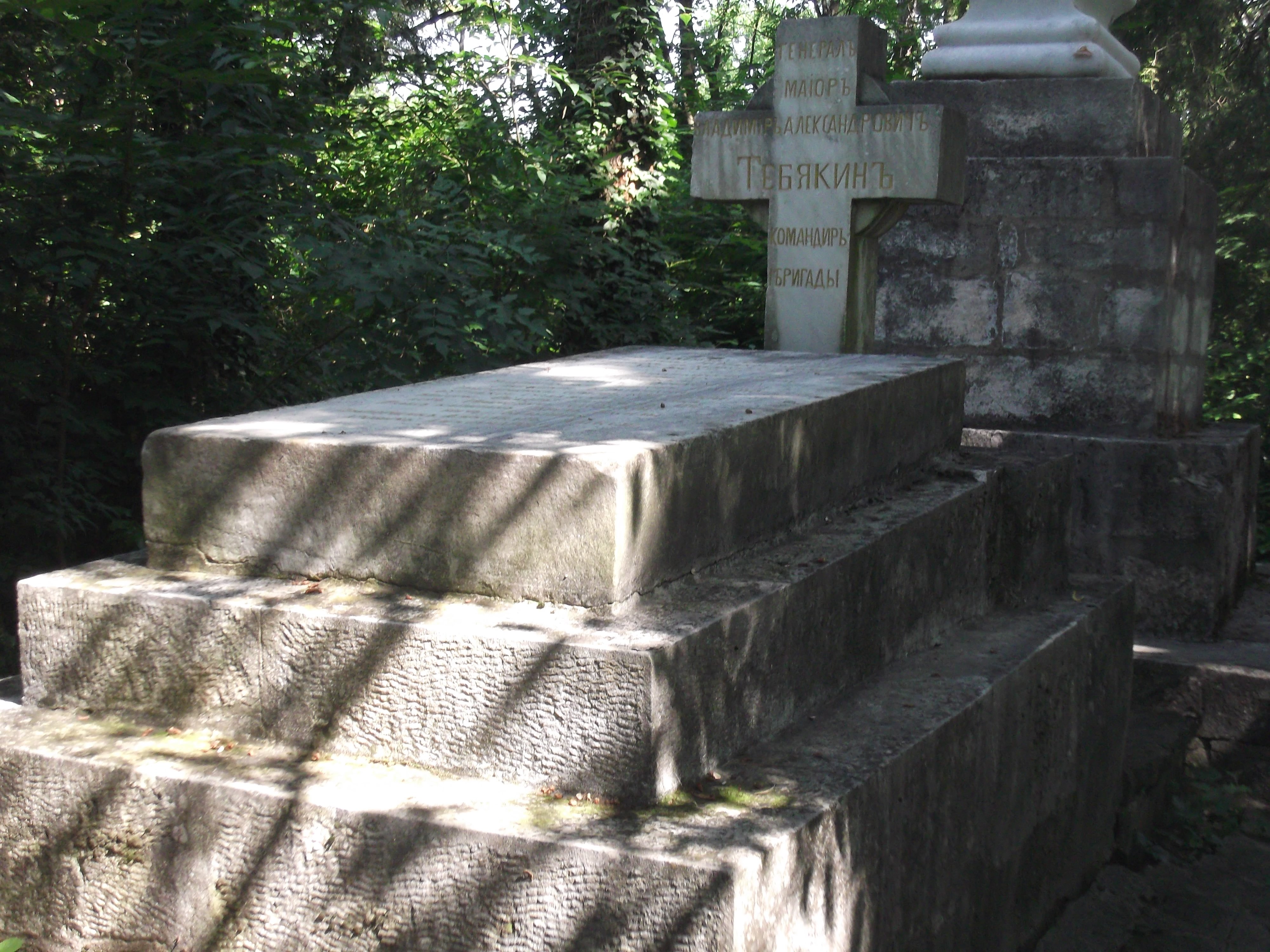 паметник на загиналите от 61 Владимирски и 62 Суздалски полк в третата атака на Плевен